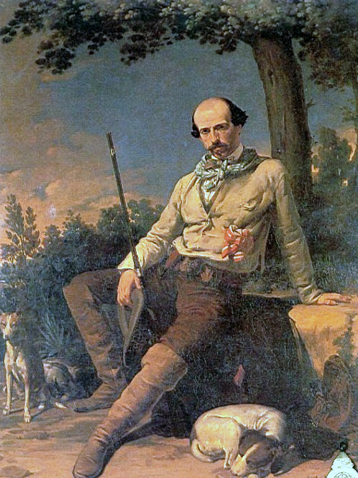 Autorretrato del pintor español Joaquín Domínguez Bécquer (1817-1879).